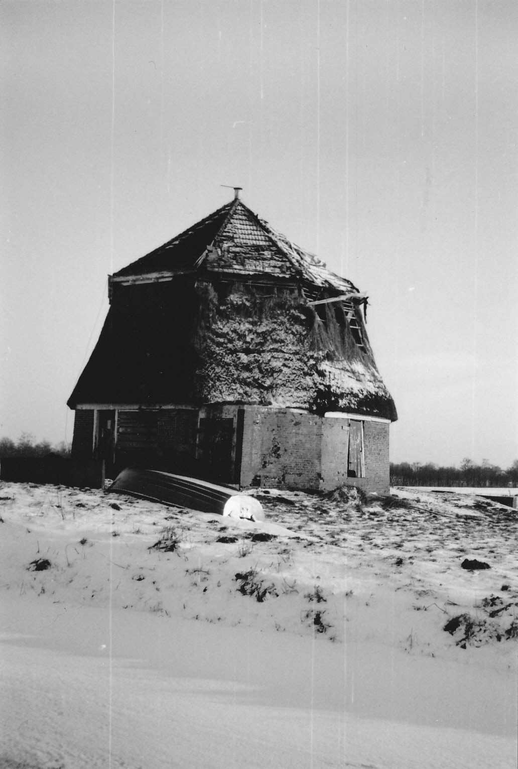 Voor de restauratie en omvorming tot woonhuis, foto genomen vanaf bevroren vaart.